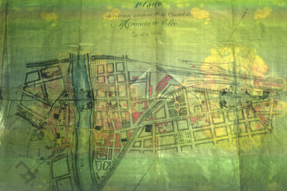 Plano de reformas interiores de la Ciudad de Miranda de Ebro